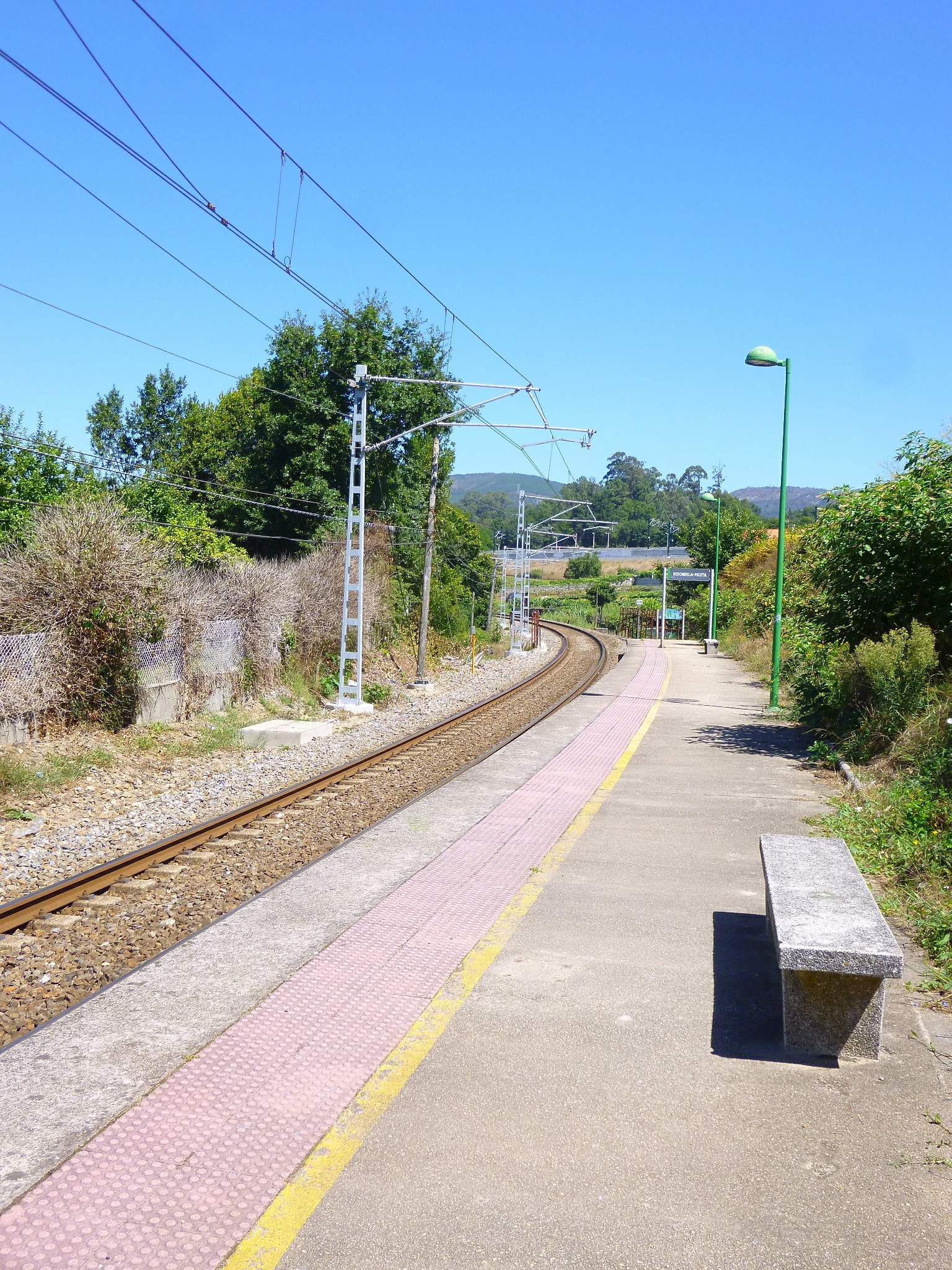 Estación de Redondela-Picota (Redondela, provincia de Pontevedra, Galicia).